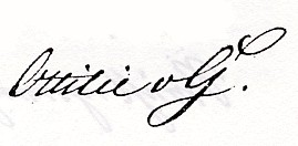 Autograph der Schriftstellerin Ottilie von Goethe.